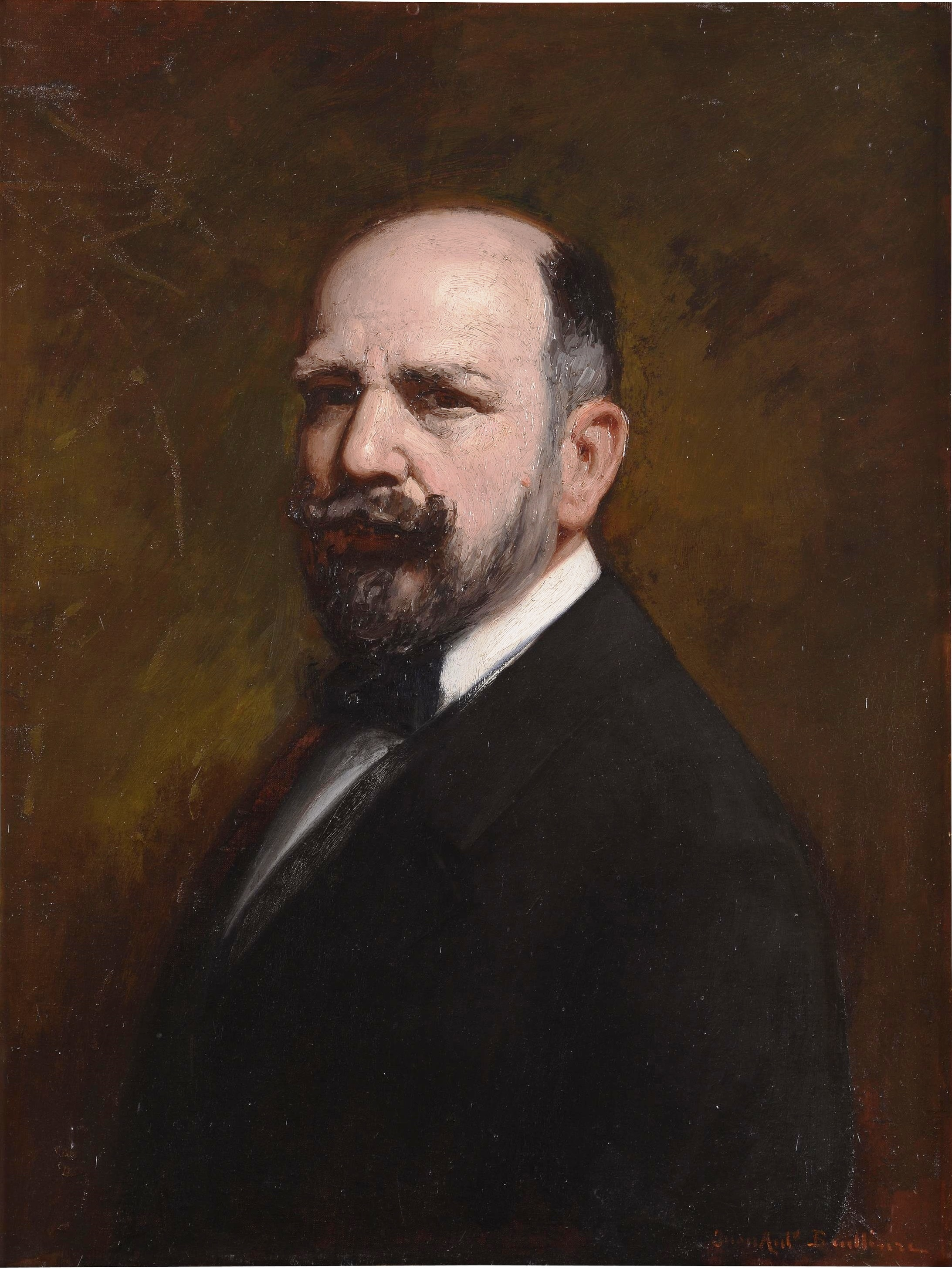 Autorretrato del pintor español Juan Antonio Benlliure y Gil (1860-1930).